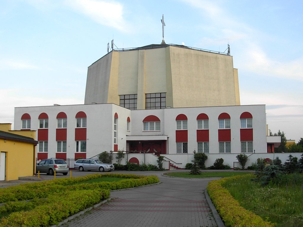 Kościół Opatrzności Bożej w Bydgoszczy na Kapuściskach